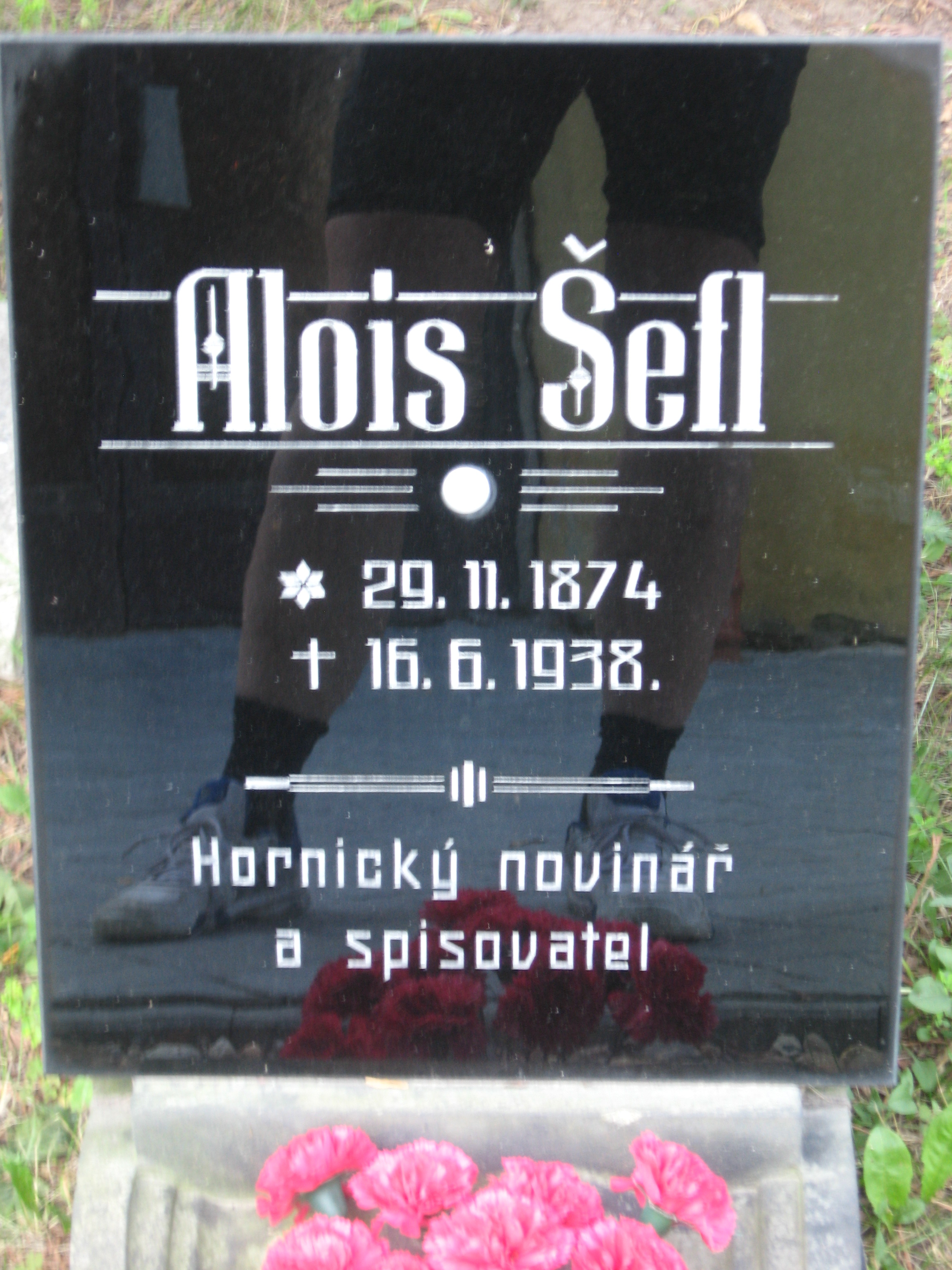 Náhrobek Aloise Šefla na duchcovském hřbitově